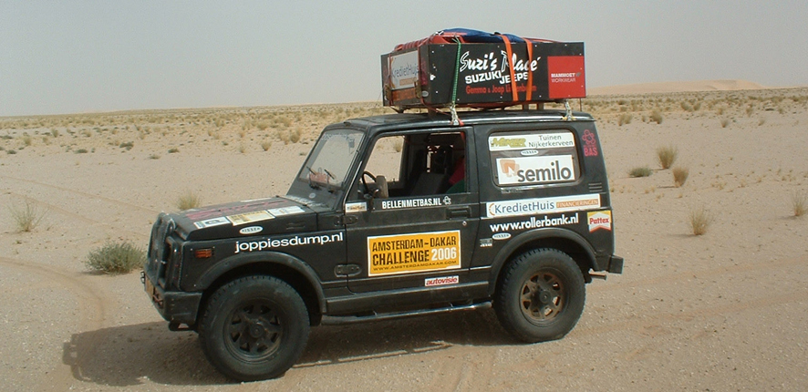 Description Amsterdam - Dakar auto in woestijn Mauritanie DateNovember 2006Source StevensPermission (Reusing this file) 1-1-2007 Amsterdam - Dakar auto in woestijn Mauritanie